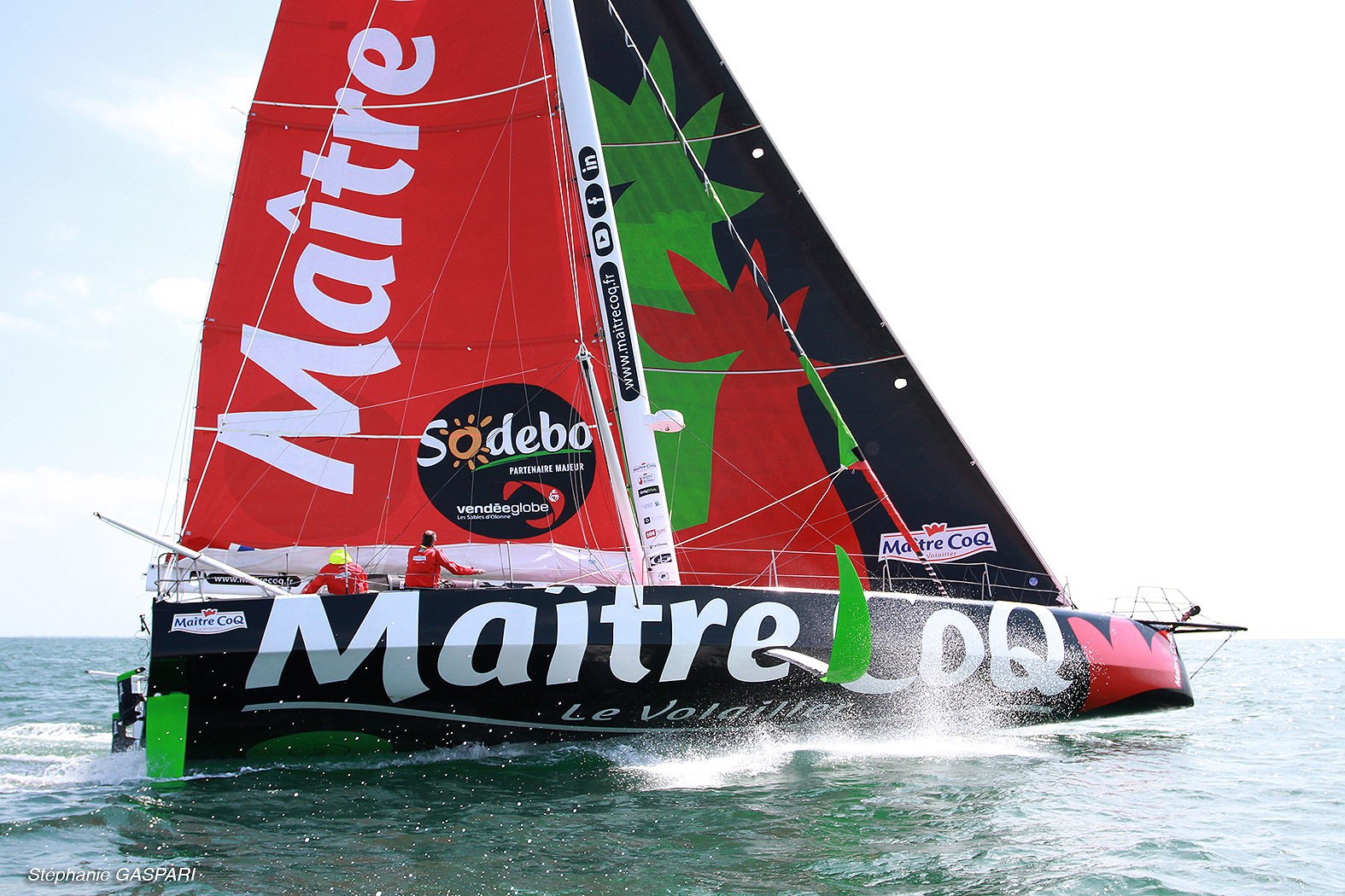 IMOCA MAITRE COQ IV en navigation